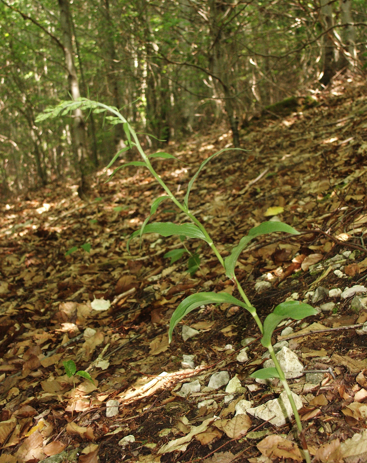 Epipactis muelleri, Härtsfeld, Germany